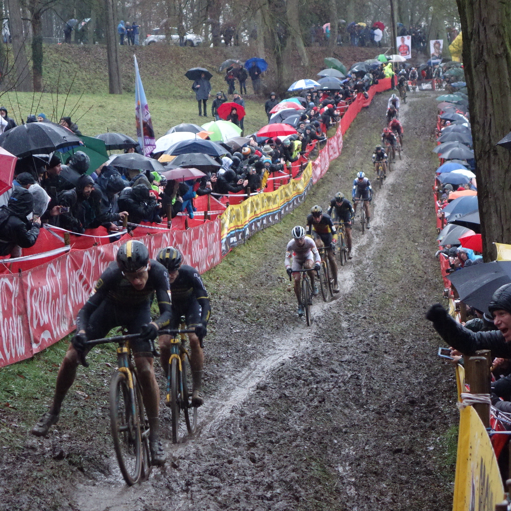 Wereldbeker veldrijden op de Citadel van Namen op zondag 22 december 2019